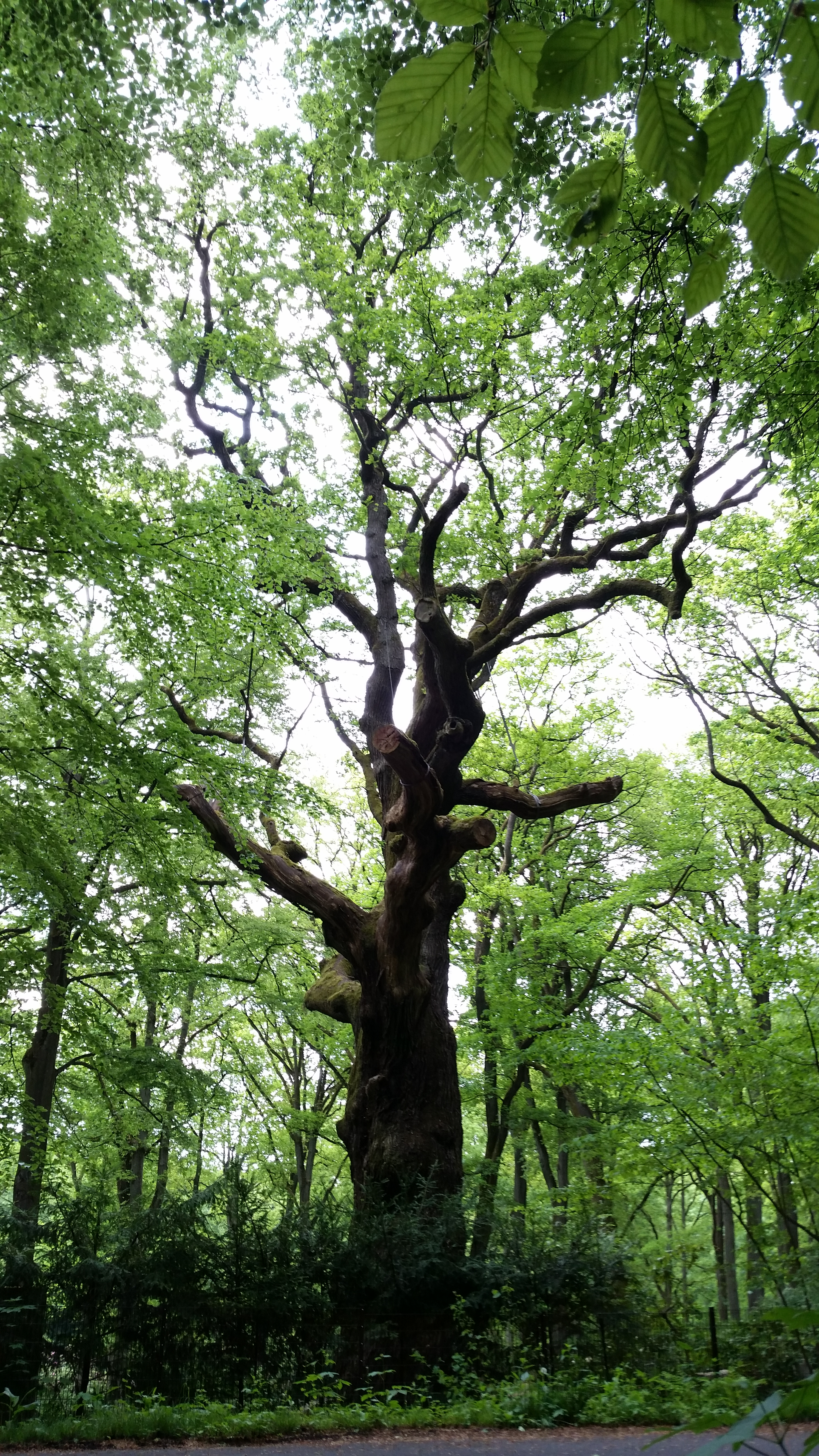 350-400 Jahre alte Traubeneiche mit Stammumfang 5,85m und Höhe 27m (alles vor 1990). Naturdenkmal